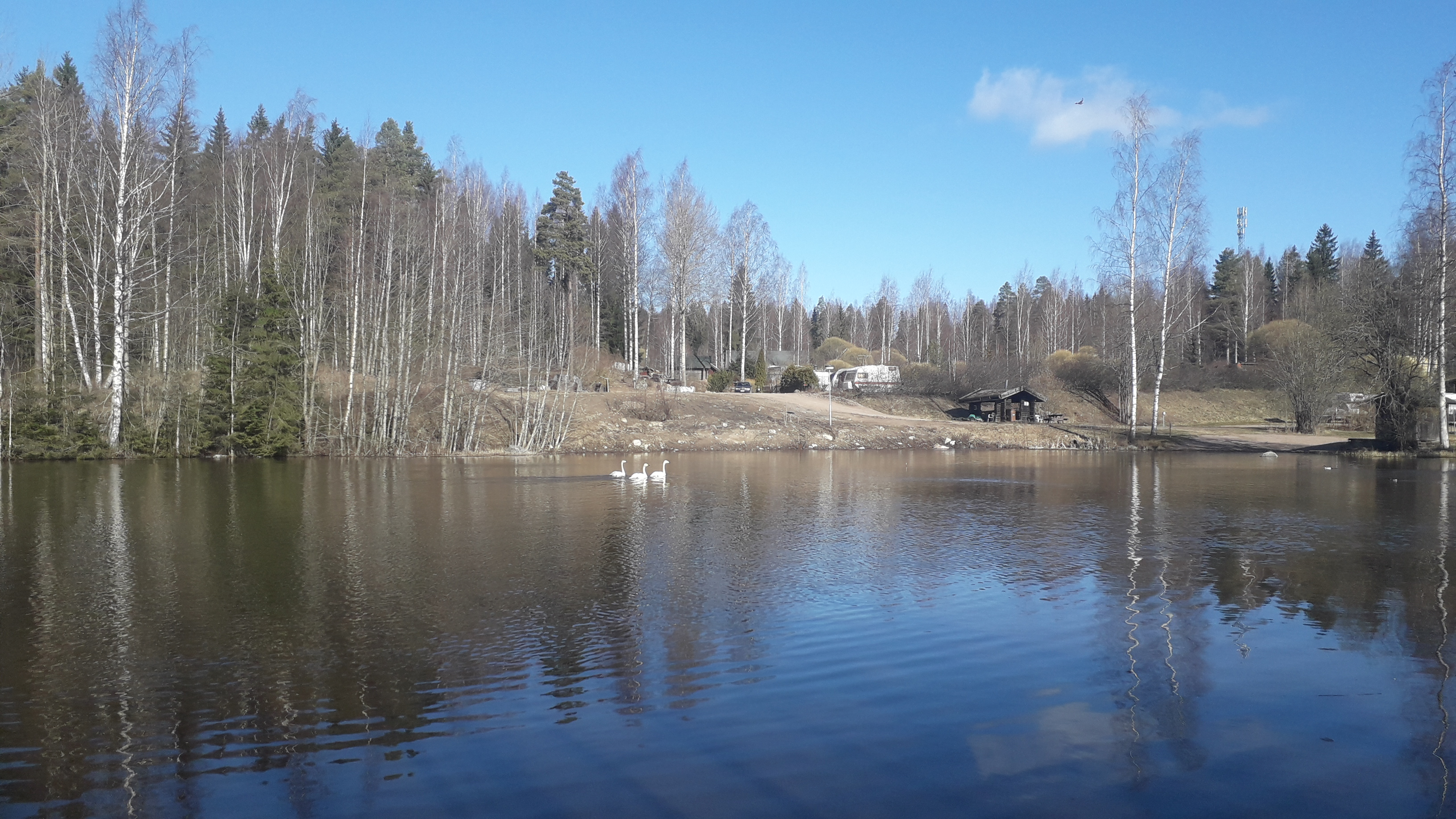 Riihimäellä sijaitseva Lempivaaran matkailualue maaliskuussa 2020.